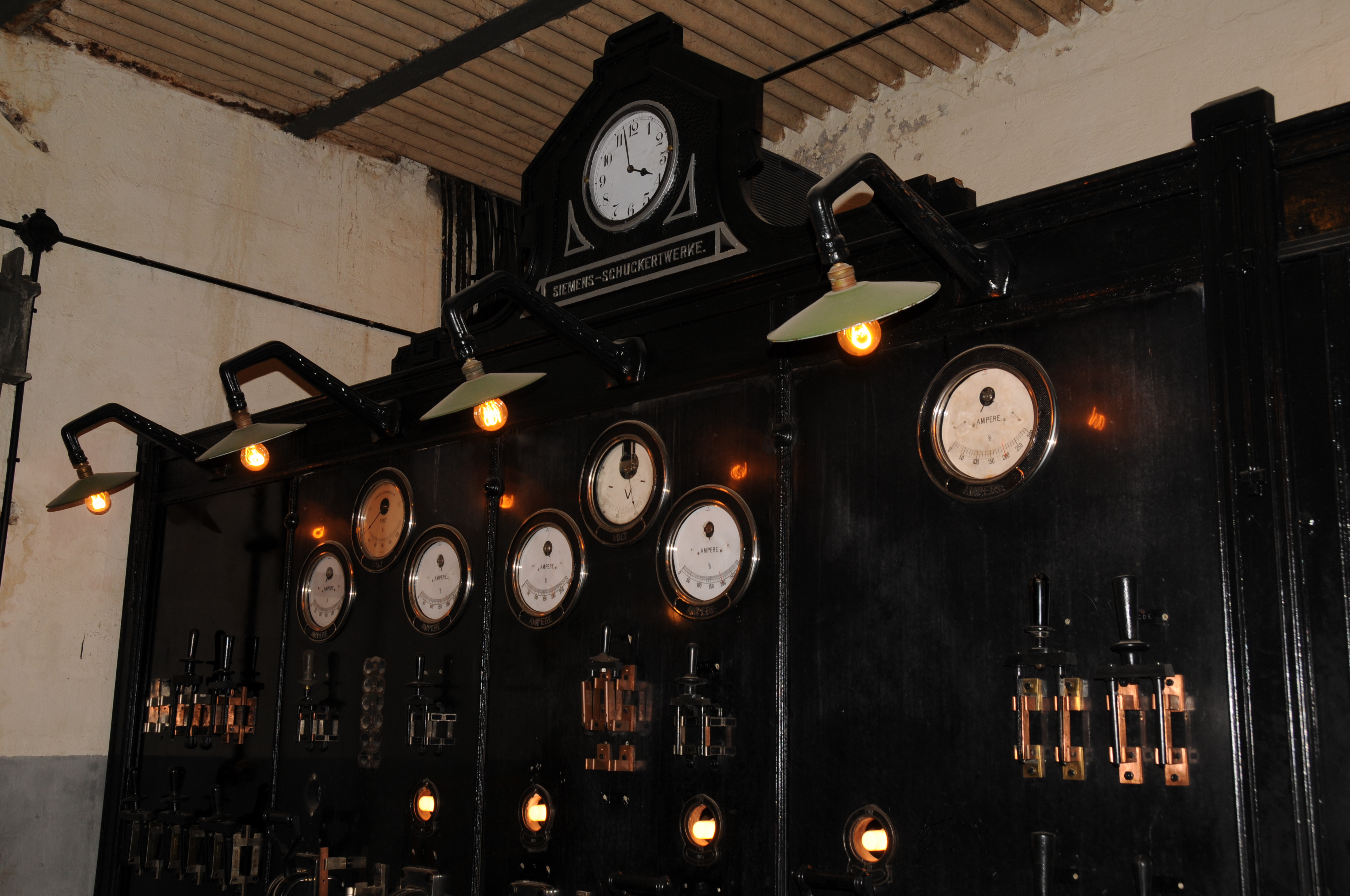 Elektrische Schaltzentrale der Firma Siemens-Schuckert in der Feste Kaiser Wilhelm II.